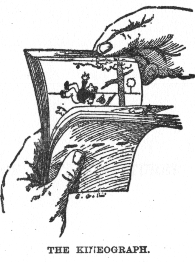 Kineograph